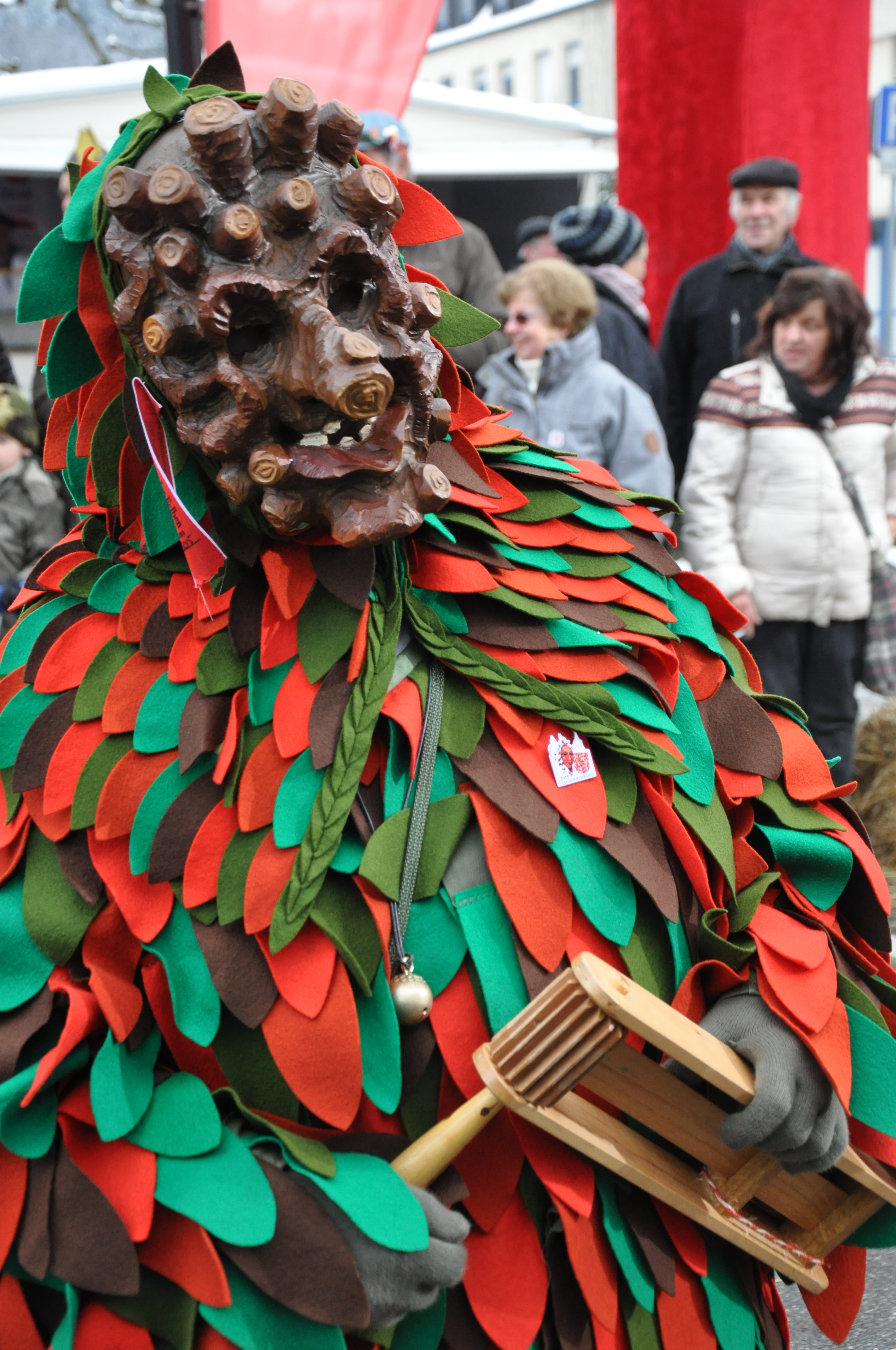 Kübelesmarkt Bad Cannstatt, Narrenfigur: Felbe Fotografiert beim Landschaftstreffen der Vereinigung Schwäbisch-Alemannischer Narrenzünfte (VSAN) 2015 in Weingarten; Narrensprung am Sonntag, 25. Januar 2015